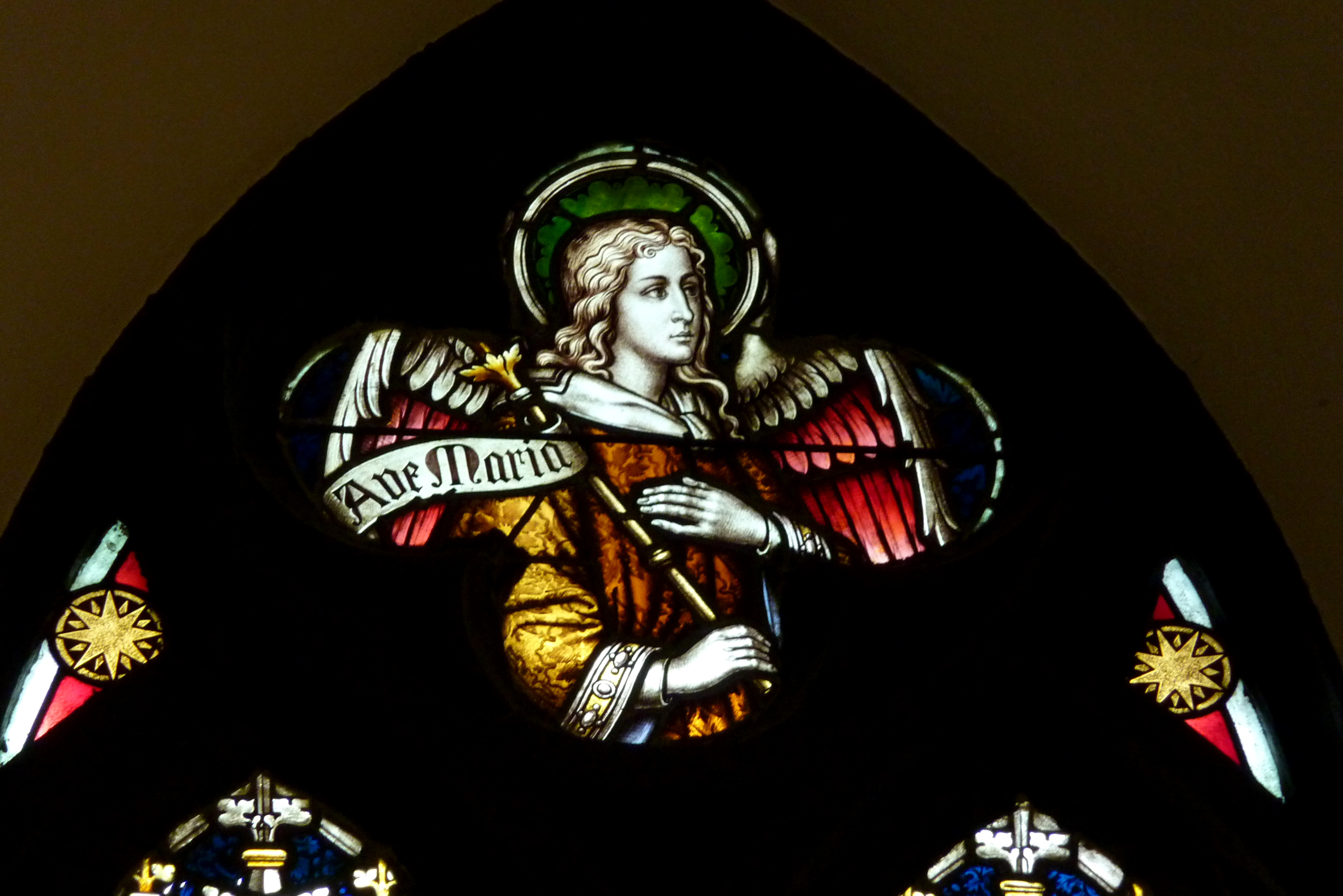 Bleiglasfenster in der katholischen Pfarrkirche St. Rochus in Hauset, einem Ortsteil von Raeren in Belgien, Ausschnitt eines Chorfensters(Kreuzigungsfenster) mit der Darstellung: Erzengel Gabriel, ausgeführt 1910 von der Glasmalerei Oidtmann (siehe E. Ignace De Wilde u.a., Hauset. Seine neogotische St.-Rochus- und Genoveva-Kirche und die alte St.-Rochus-Kapelle. European University Antwerpen, Antwerpen 1995, S. 100)